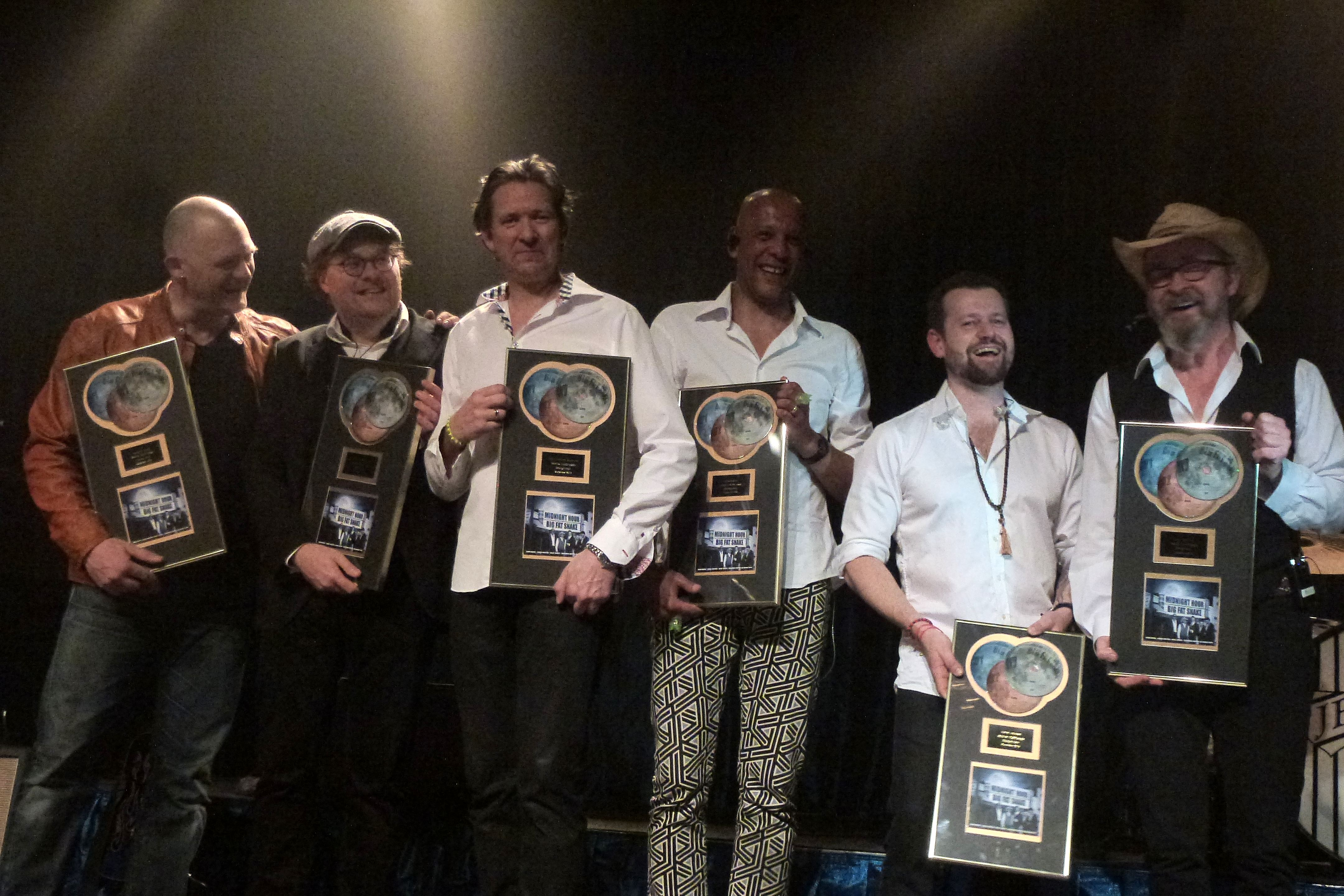 Big Fat Snake modtager guld for deres plade "Midnight Hour"